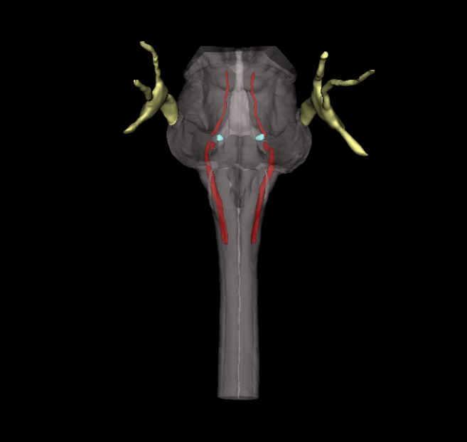 Enbor entzefalikoan trigeminoaren nukleoak eta nerbioa bera. Anatoramako irudia.